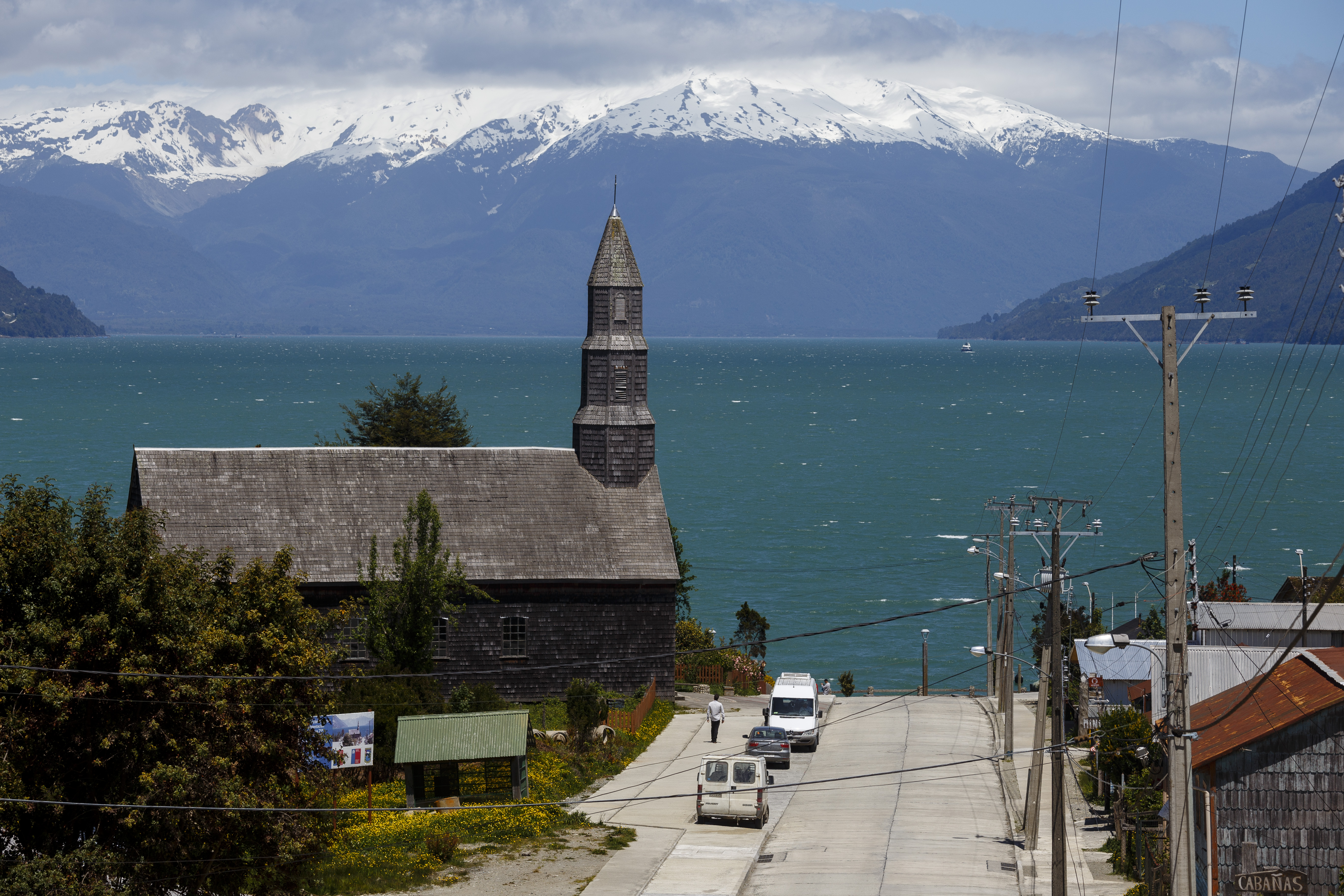 Puelo River